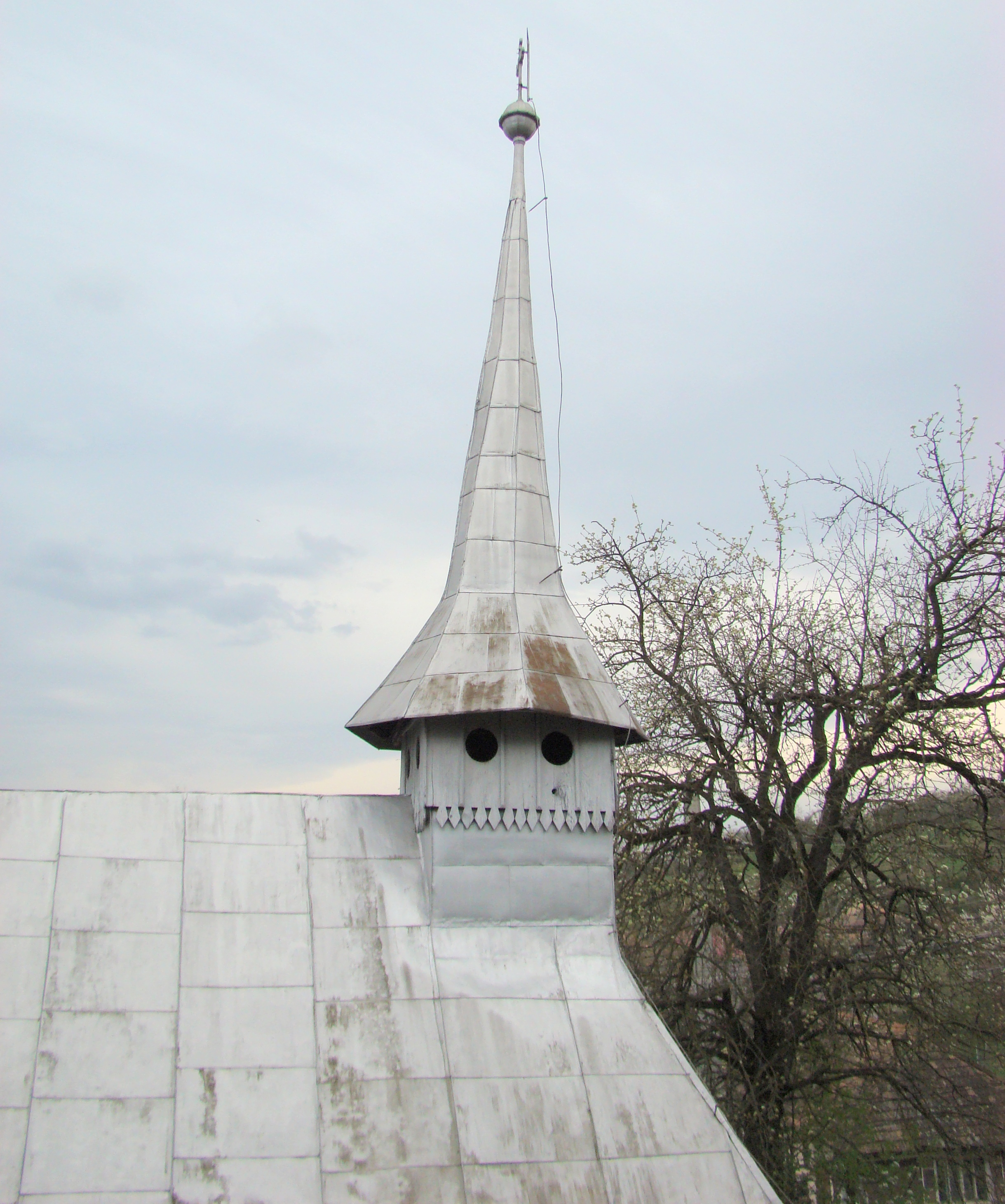 Biserica de lemn "Sfinții Arhangheli Mihail și Gavriil" din Chichișa, comuna Românași, judeţul Sălaj